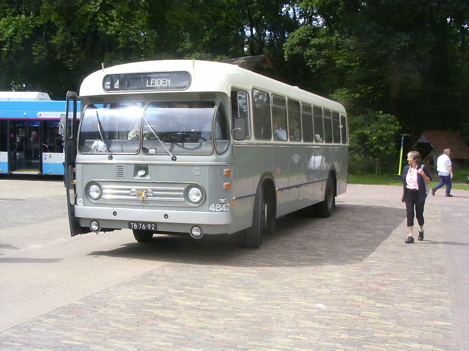 Arnhem, Openluchtmuseum, NZH 4842 bolramer. Kenteken TB-76-92. Eigenaar Haags Openbaar Vervoermuseum